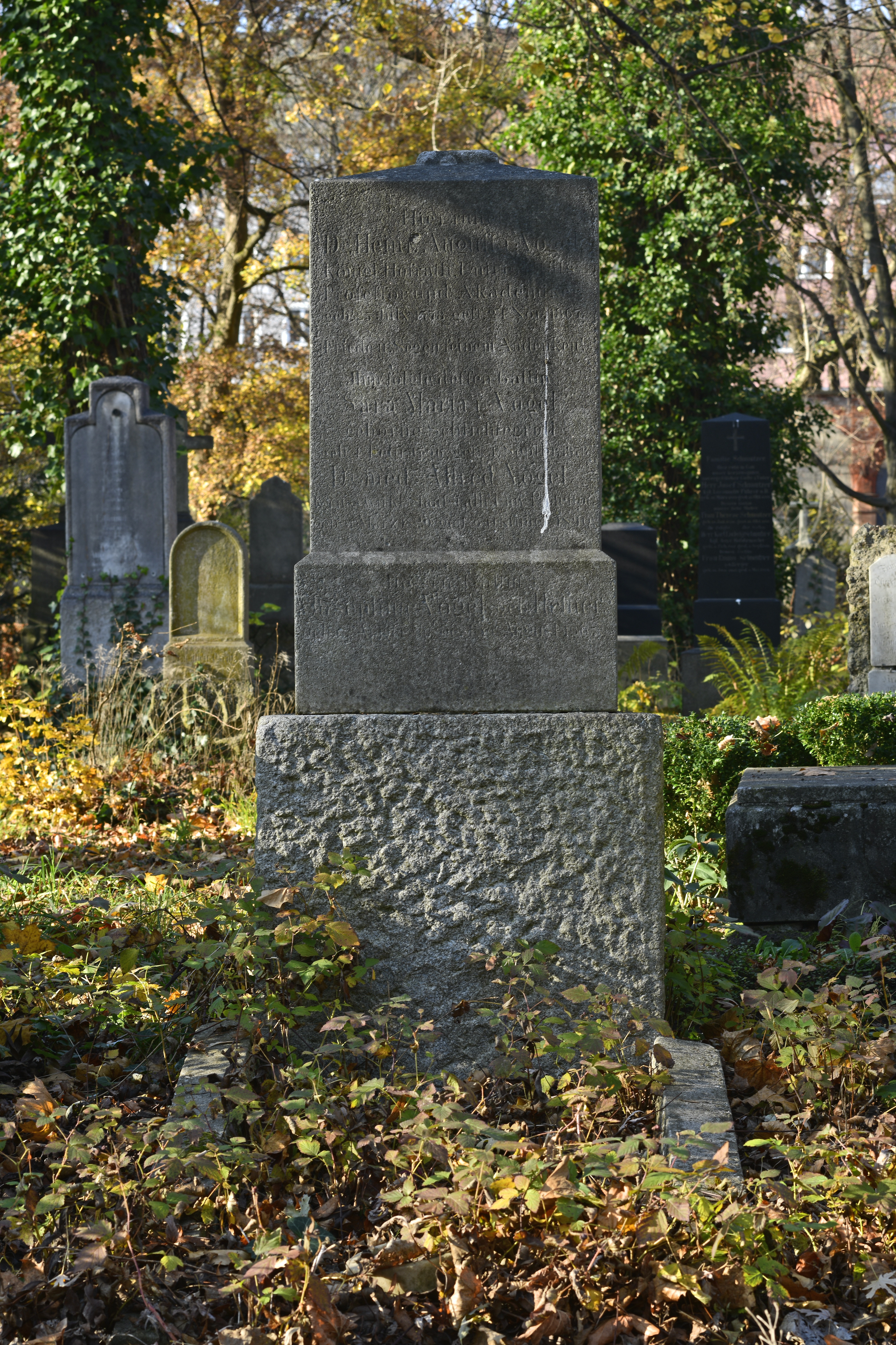 München. Alter Südfriedhof München. Grablage 29-01-04 Familiengrabdenkmal Vogel.